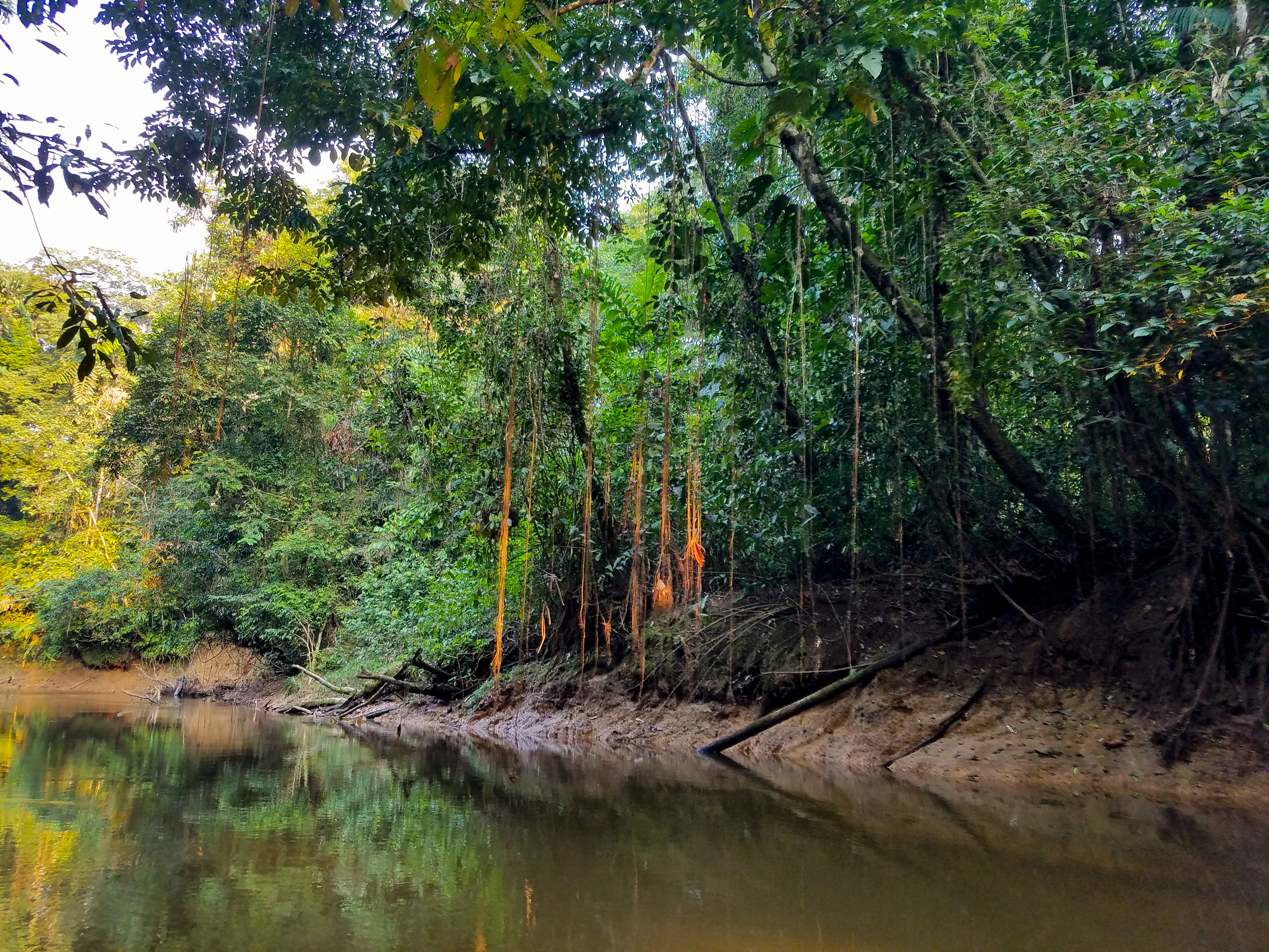 Luftwurzeln im tropischen Auenwald am Río Cuyabeno, Ecuador